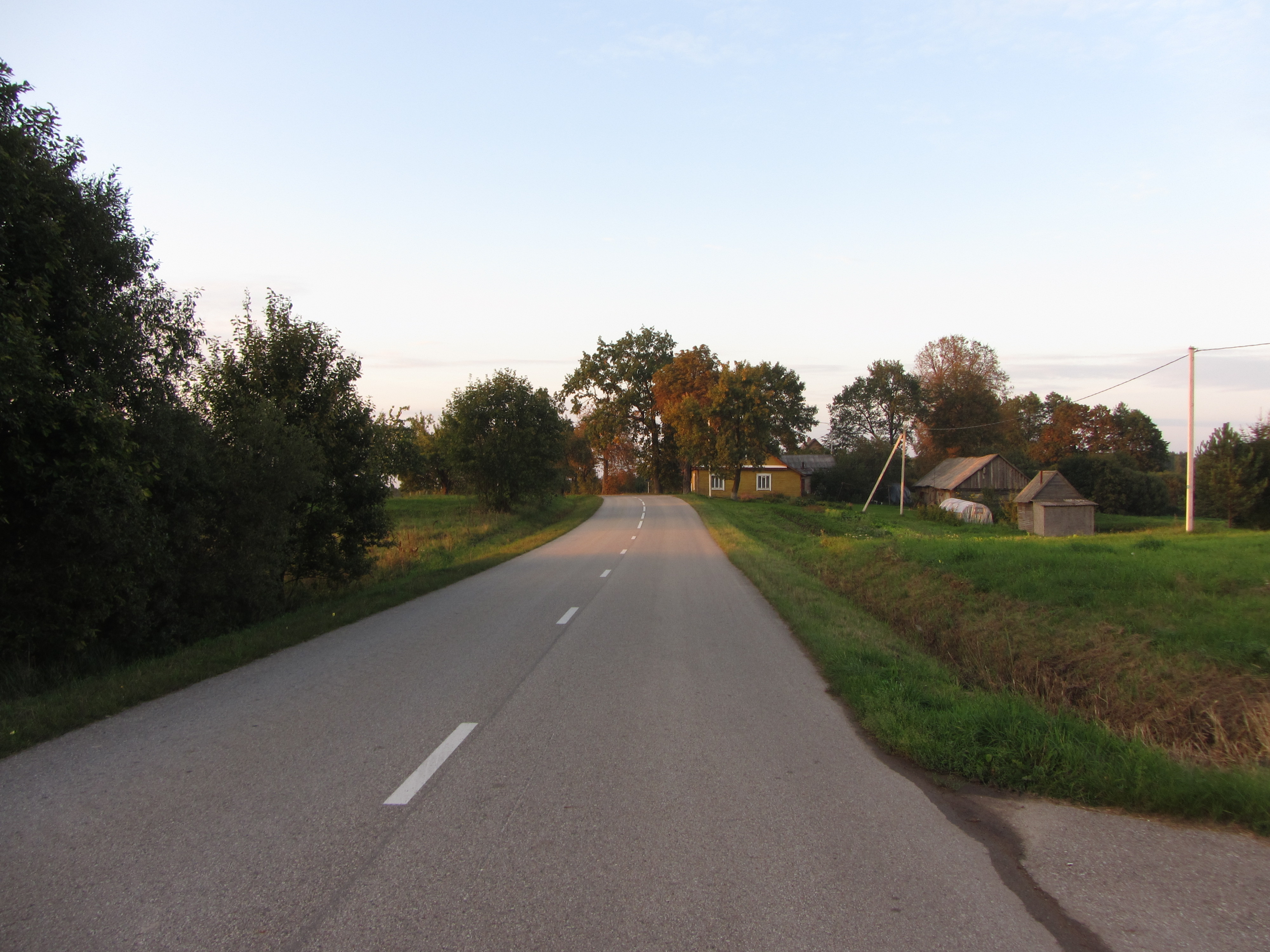 Raudoniškis, Lithuania